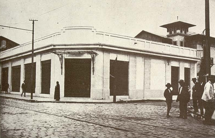 Frontis de la tienda Gath y Chaves en Talca en diciembre de 1928. Descripción original: "Casa Gath y Chaves - calle Comercio [actual intersección de calles 1 Sur y 2 Oriente]. Edificio de concreto que es un ejemplo elocuente de buena construcción. A pesar de su situación en esquina ha sido el que mejor resistió en todo Talca. Como dato curiosa anota­remos que los seis grandes cristales de las ventarias quedaron absolutamente intactos"